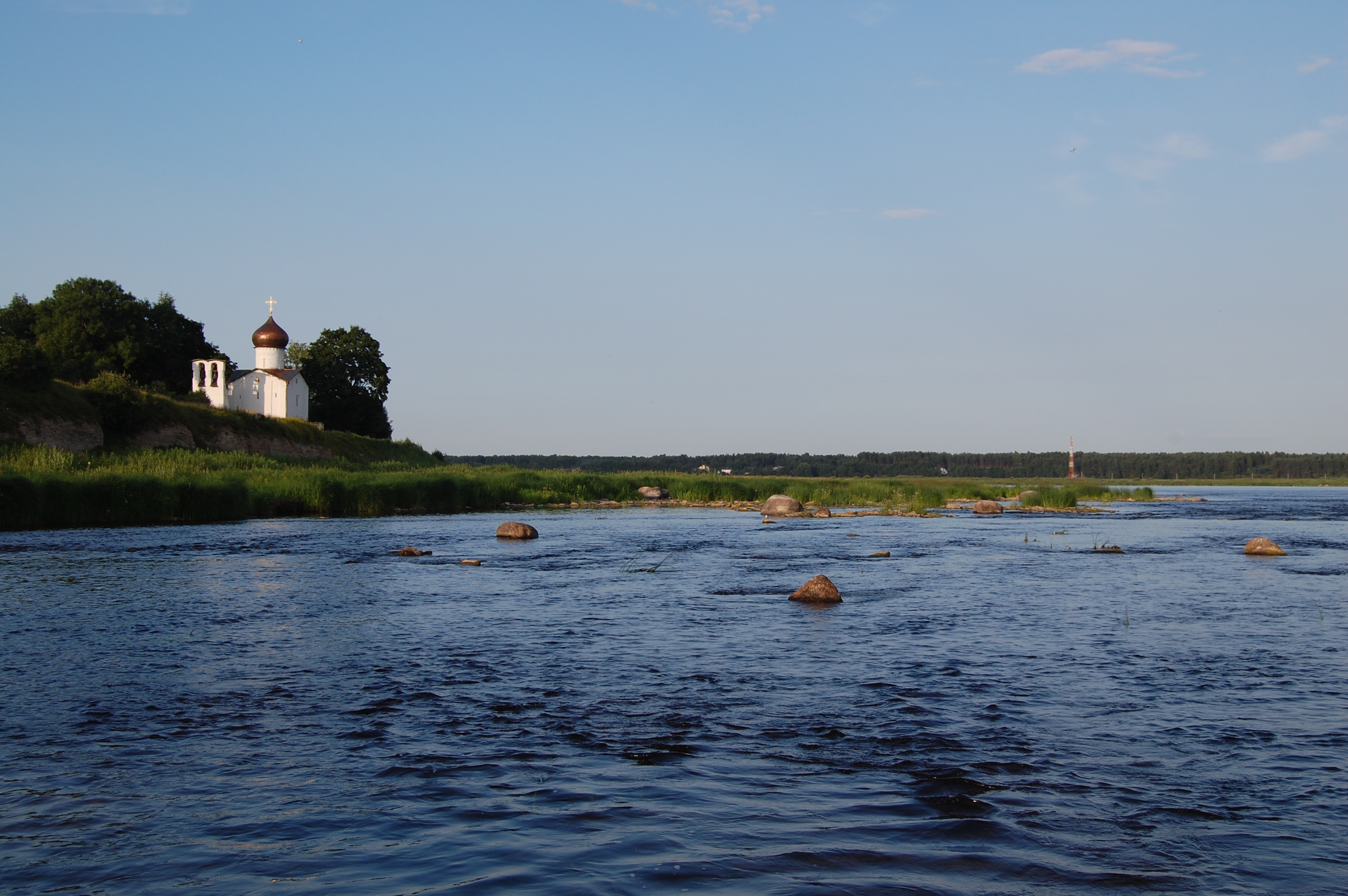 Церковь Ильи Пророка (Псковская область, Псков, погост Выбуты)